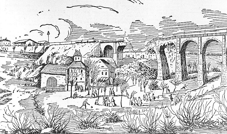 Original image description from the Deutsche Fotothek Löbau. Ehem. Wetschkemühle neben der eingestürzten Eisenbahnbrücke 1855, aus: Neuer Görlitzer Anzeiger vom 7.11.1926